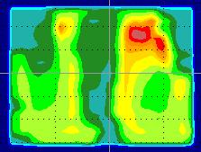 Fluenzmatrix eines Einzelfeldes zur IMRT